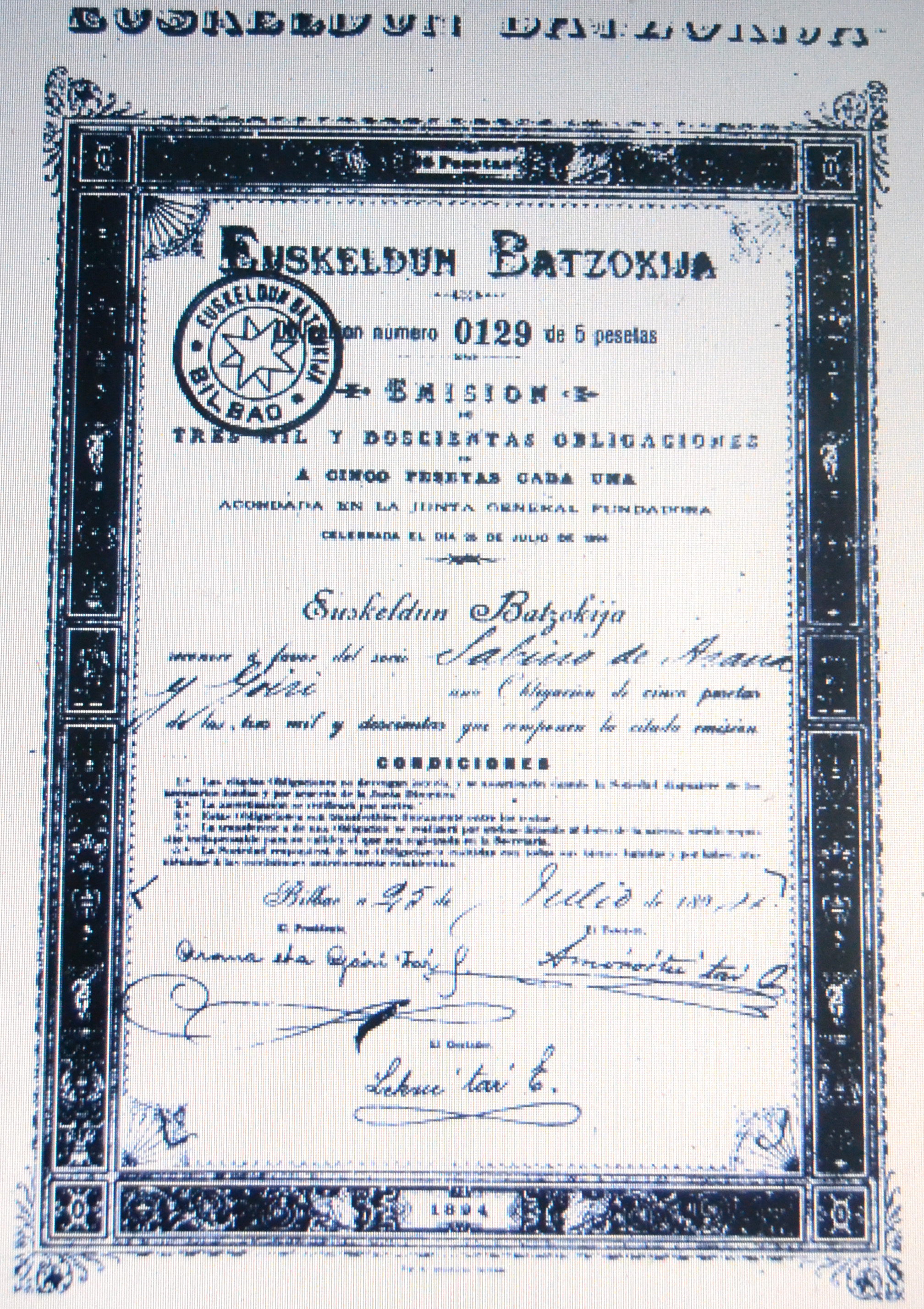 Euskeldun Batzokija, 1894